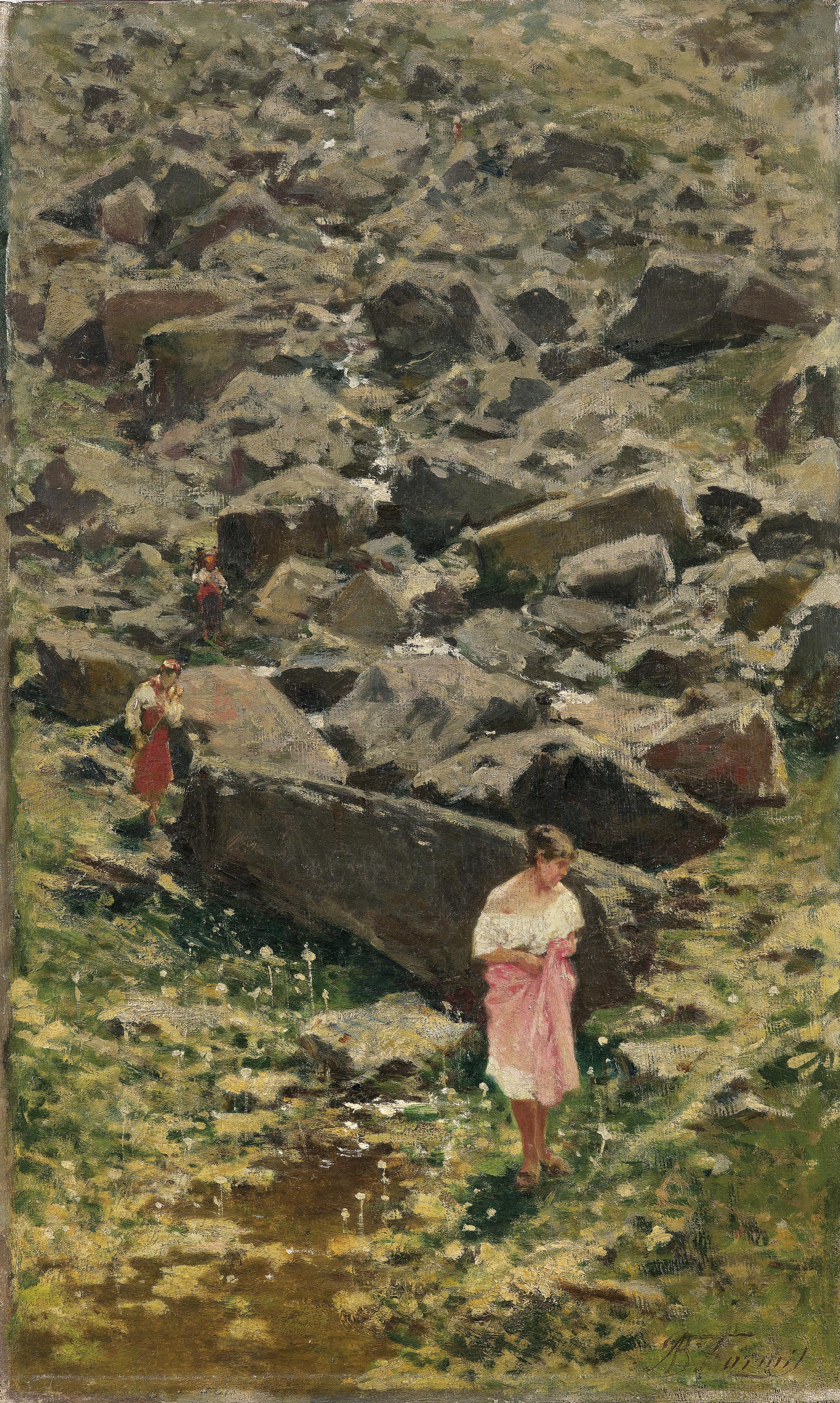 Felsige Landschaft mit jungen Frauen am Bachufer